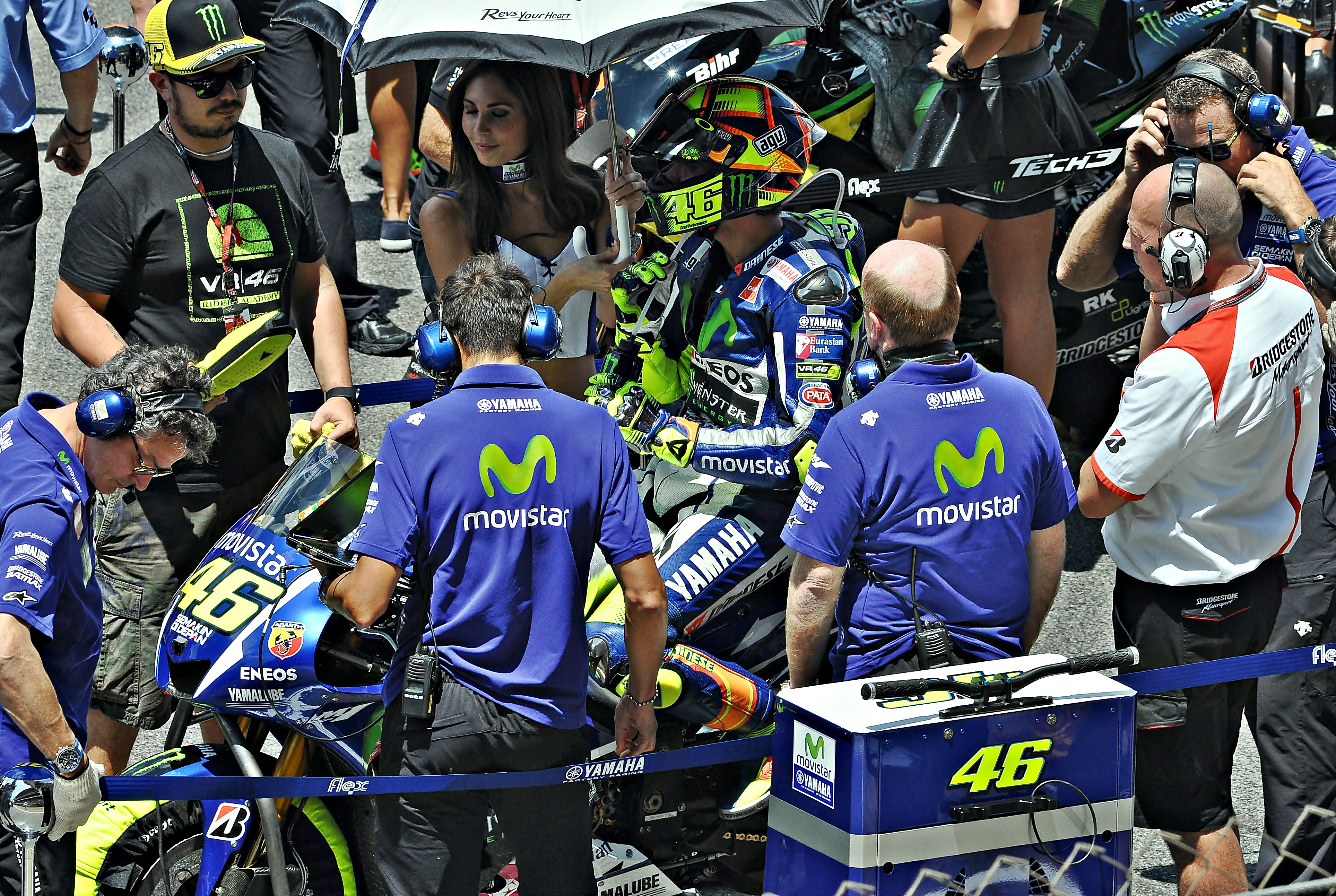 gran premio de cataluña